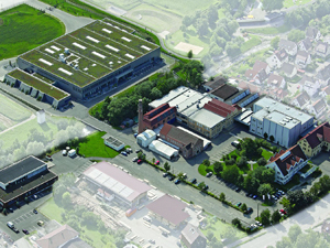 Firmengebäude Lechler GmbH